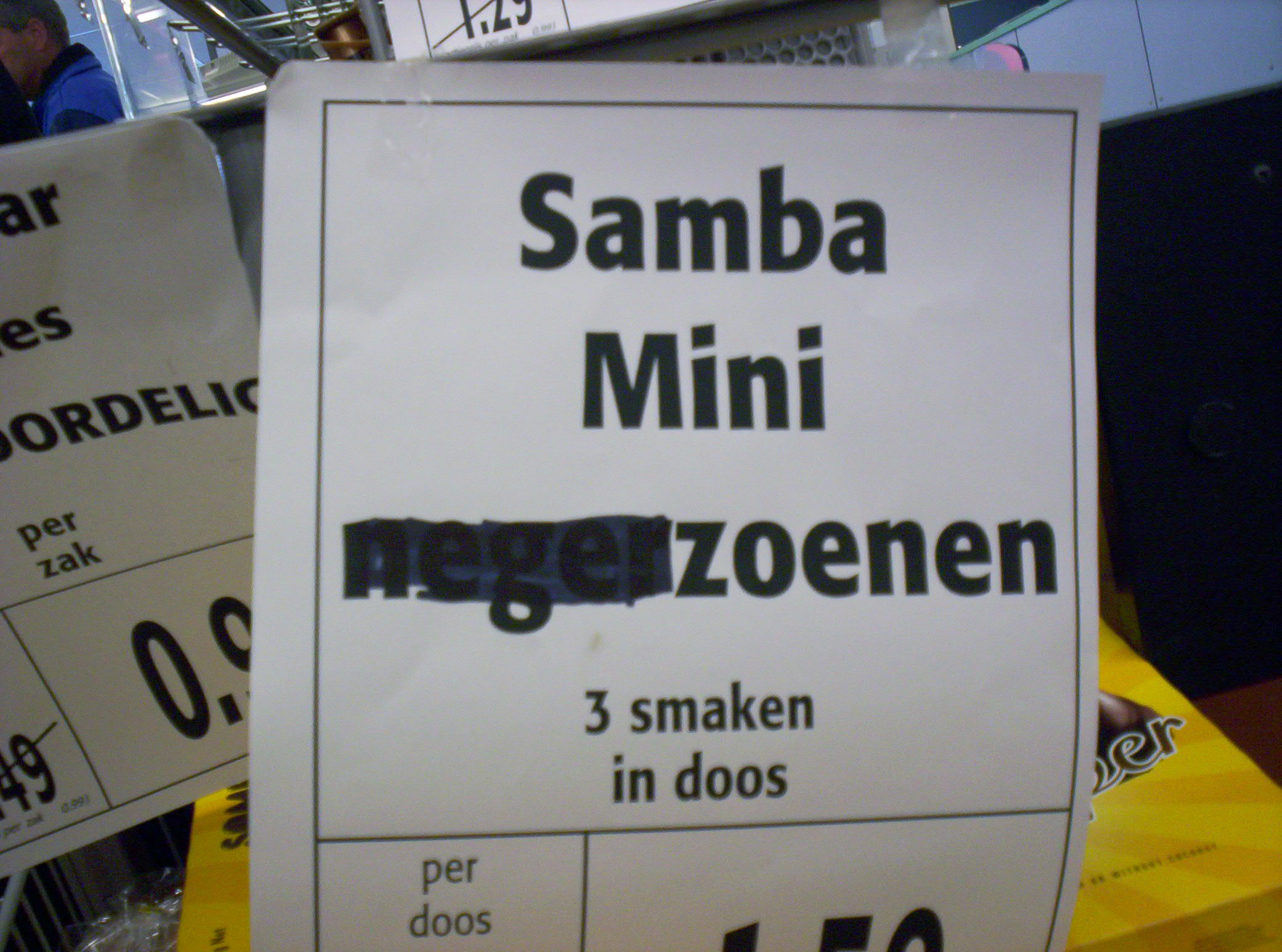 SAMBA mini NEGER zoen in doos (3 smaken) 060330 2 Het blijkt dat C1000 de ZOENEN, zoals ze ze nu noemen, in de aanbieding hebben gedaan "omdat de naam NEGERZOENEN niet meer mag worden gebruikt". Op de SAMBA KISSES ('Samba kisses better'= de slogan) staat bij ingrediënten, op de achterzijde: NL Negerzoenen met of zonder gedroogde cocos ( Wafel met zachte schuimvulling bedekt met een chocoladelaagje,mef of zonder gedroogde cocos ) Ingredienten: Suiker, glucos, water, plantaardif vet, cacao, tarwemeel, gedroogde cocos (1,5%), eiwit, emulgator (E322, E492), maiszetmeel, aroma's, stabalisator (E406), zout, eigeel. Koel bewaren. Ik heb de fabrikant (ELVIRASMINDE A/S, Denemarken) gevraagd wat de nieuwe naam gaat worden die ze op de nieuwe verpakking gaan drukken. OP 060331 is het antwoord: Dear Mr. Bankers, thjank you for your kind comments. Our new name, which you already find on some of our packages is Chocozoenen. Best regards, Søren Terndrup Hansen Elvirasminde A/S In 2000 schreef ik al: De Koekoekskoek, de Rookborstplaat, Koffij met punten, en de groeten van Flip Spokulaas ofwel: de gevolgen van onze taal voor de economie van: Flip Spokulaas, Dollestraat 6, Deurne aan: de heer / mw Buys, Negerzoenen Nederland B.V., Lollestraat 40, 4631 GL Oudenbosch datum 17 01 2000 Geachte heer en mevrouw Buys, Wie kent uw negerzoenen niet, en wie zal op den duur niet gaan verlangen naar knipogen of schouderklopjes van uw kant ? In Engeland, waar ik woonde, maakt men van chocolade zelfs konten * ! God bewaar ons hier - maar dat u niet uw blik verruimt met een jongenszoen of een meisjeskus ! Toen ik hier in de buurt een vleesfabrikant assisteerde bij de lancering van de rookborstplaat kreeg ik nog een doos worsten toegestuurd ! - Wellicht heeft u voor mijn advies wat zoenen. "ik voel me thuis ALLEEN bij BUYS " de groeten en de fijne kneepjes van Flip Spokulaas chocolade konten